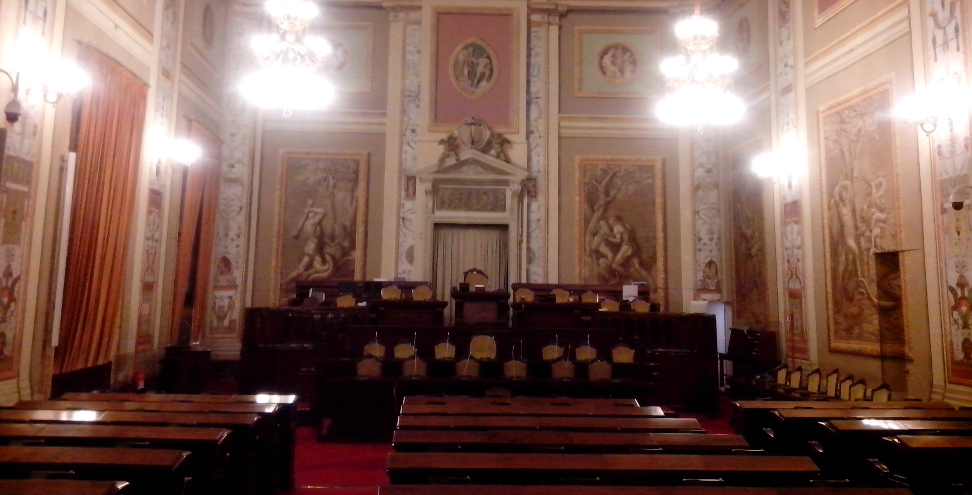 I banchi dei parlamentari dell'ARS e della giunta regionale (Sala d'Ercole) - Palazzo dei Normanni, Palermo